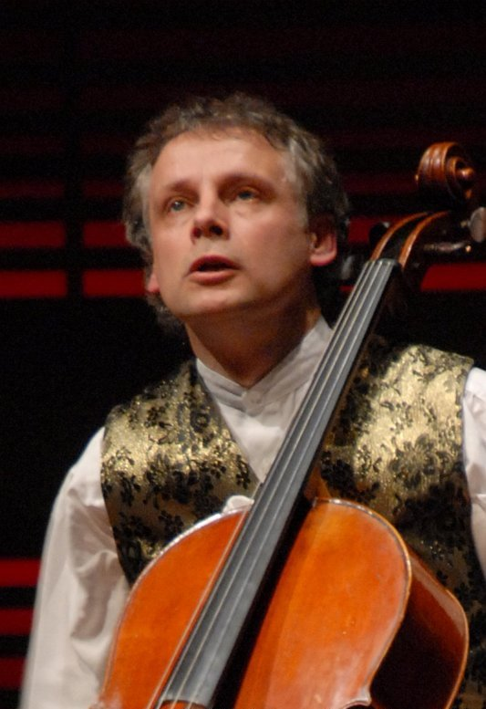 Pieter Wispelwey, Dutch cello player, 30 january 2007 Picture by Fai Ho, Dutch photographer. Licence information (in Dutch) Ik, Fai Ho, fotograaf te Amsterdam, bij Digitally.nl stel de afbeeldingen van Pieter Wispelwey en zijn begeleider Dejan Lazic, gemaakt op 30 januari 2007 in het Muziekgebouw aan het IJ ter beschikking onder een multi-licentie, dat wil zeggen onder zowel de GFDL als Creative Commons CC-BY-SA ( licentie. Ik ben de maker van deze foto's en beschik over het copyright. Zowel de heer Wispelwey als de heer Lazic hebben geen bezwaar tegen publicatie onder genoemde licenties. Mijn naam dient altijd als auteur bij de foto's te worden vermeld zoals de GFDL en de Creative Commons licenties voorschrijven. De toestemming voor het gebruik van deze mail is opgeslagen op OTRS van de Nederlandstalige Wikipedia, onder nummer OTRS nummer 2007041310008751